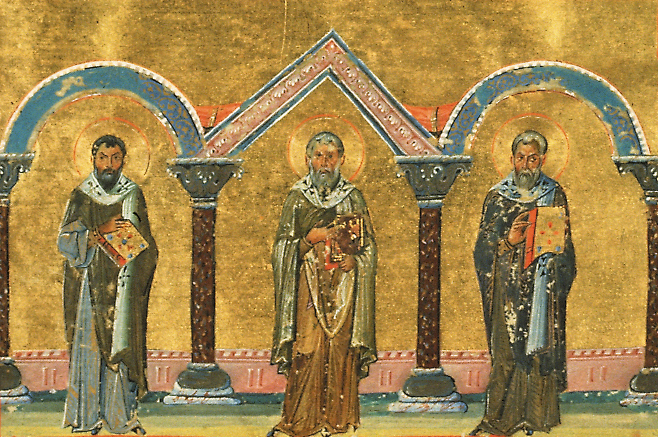 Священномученики Маркелл, Филагрий и Панкратий